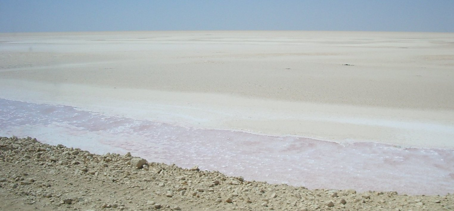 Chott el-Jérid